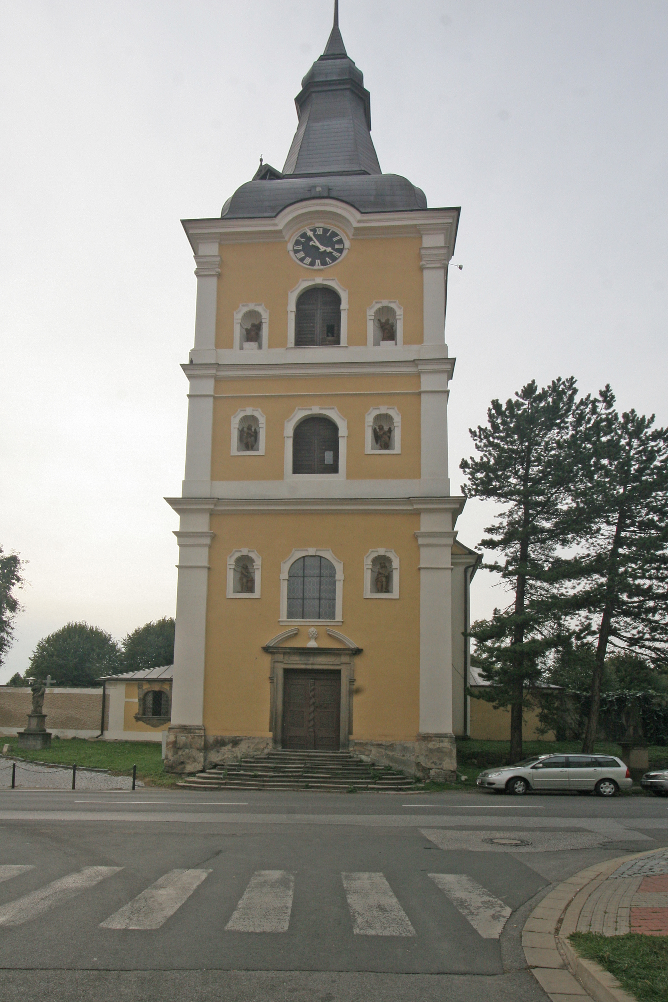 kostel P. Marie de Salle, Ruská, Jičín